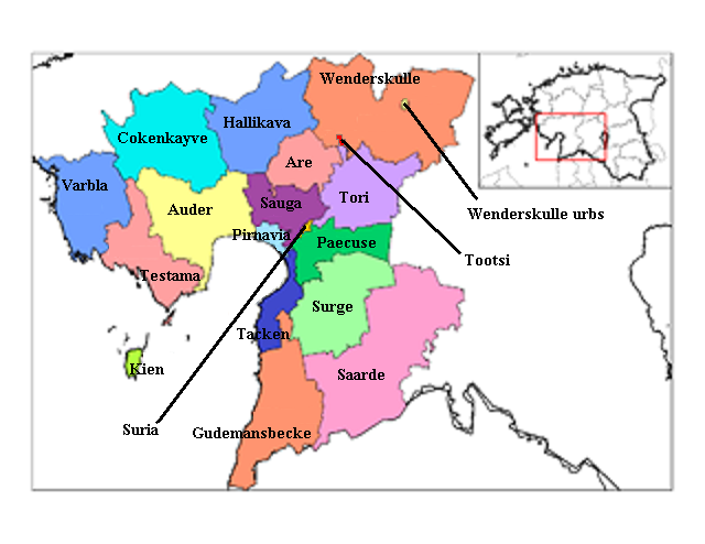 Pirnaviae municipia Latine